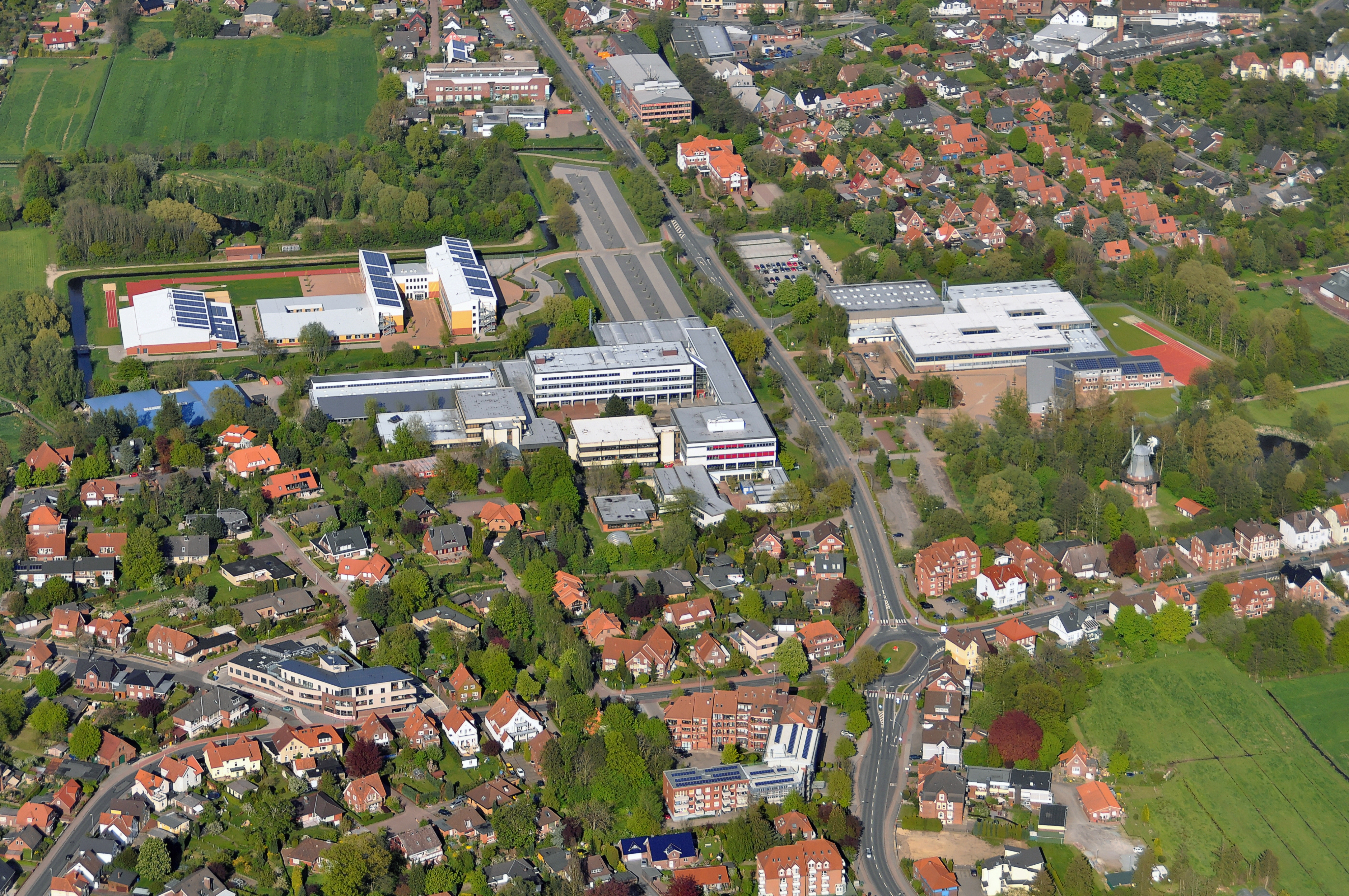 Luftbilder von der Nordseeküste 2012-05